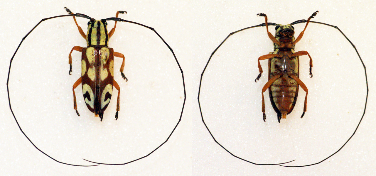 Jordan,1894 Sex: Male Data: 11-2012 - Ebogo - Cameroon Size: ?